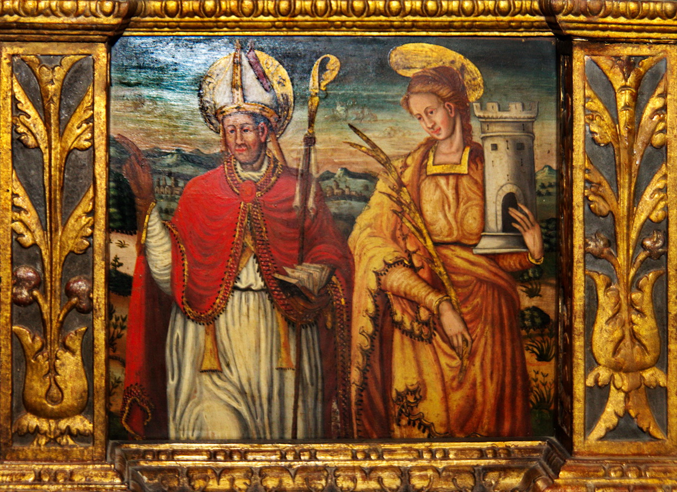 Retaule del Roser a l'església de la Doma. Predel·la, carrer esquerre (La Garriga, Catalunya)